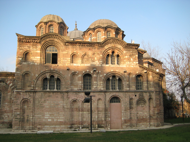 Pammakaristos Church